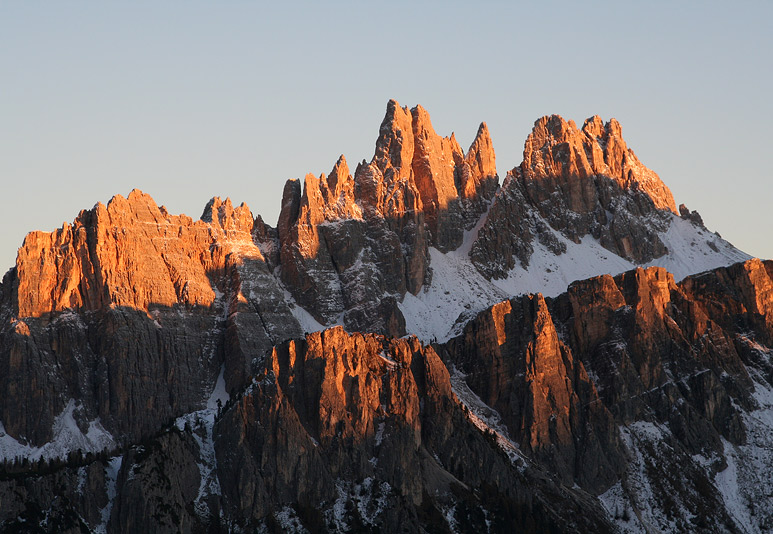 Il versante settentrionale della Croda da Lago fotografato dalla zona dell 5 torri